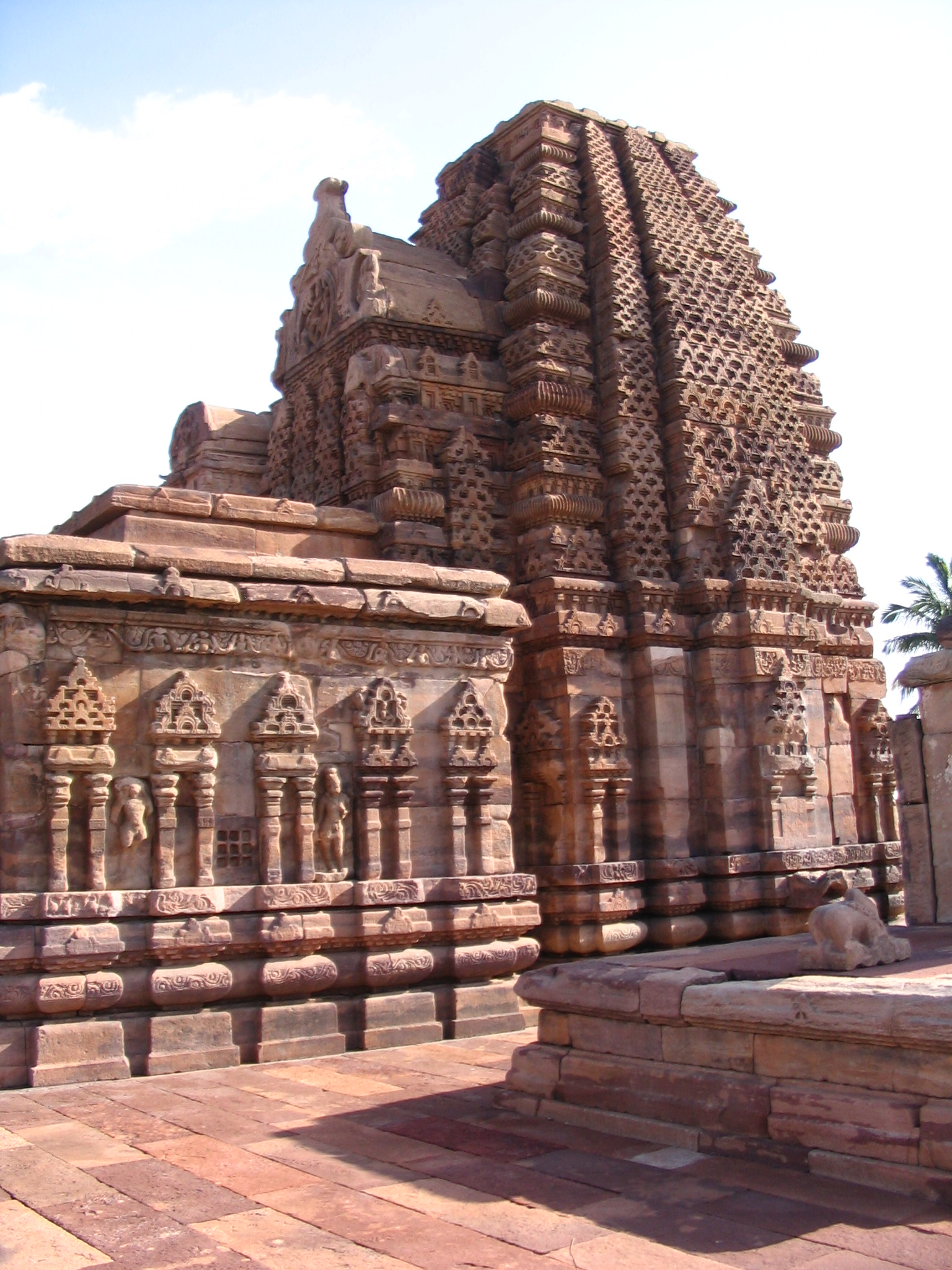 Mallikarjuna and Kashivishwanatha temples, Pattadakal